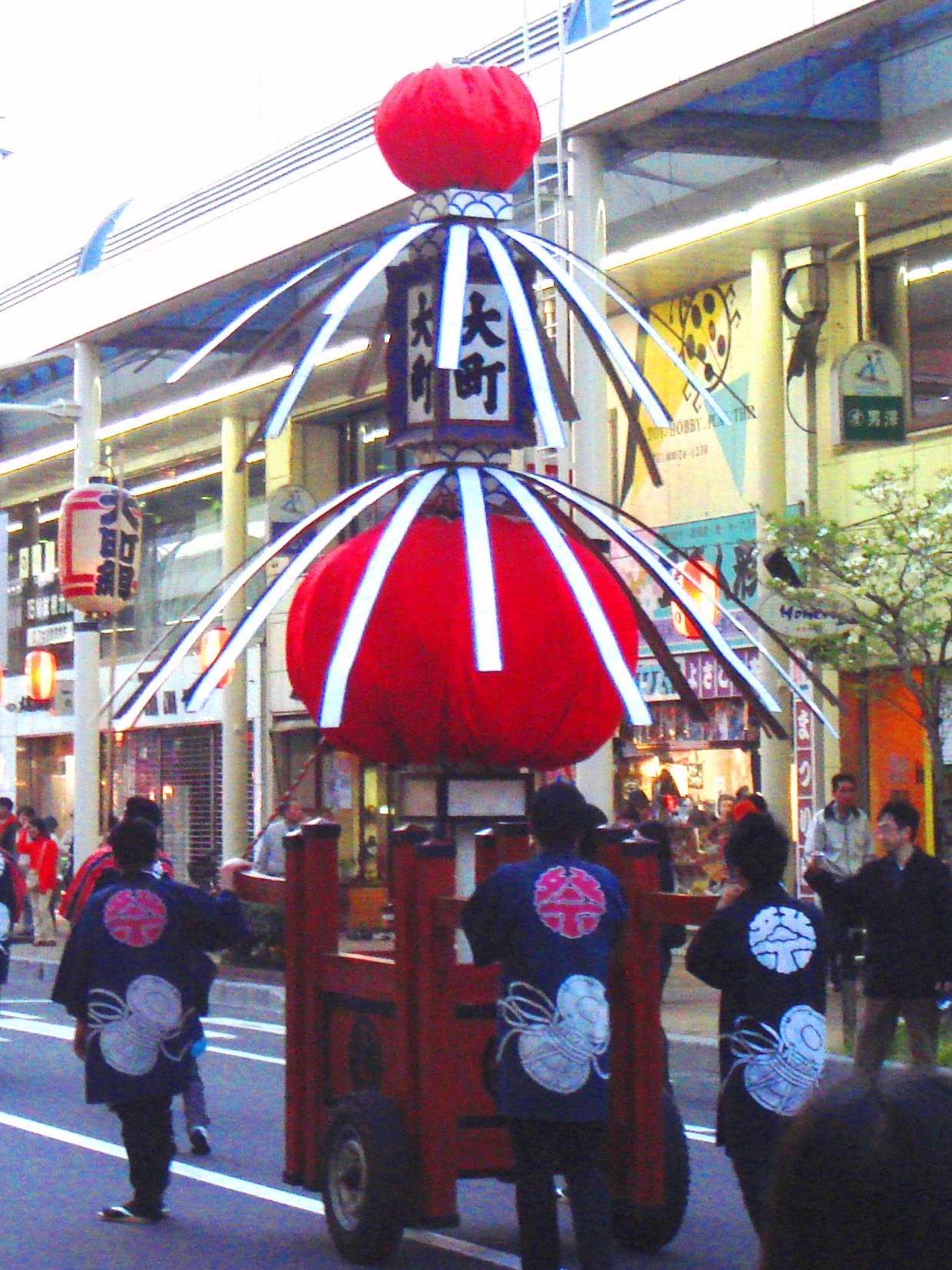 日高火防祭町印（大町組）